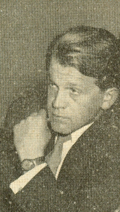 Darstellung von Theo Tupetz